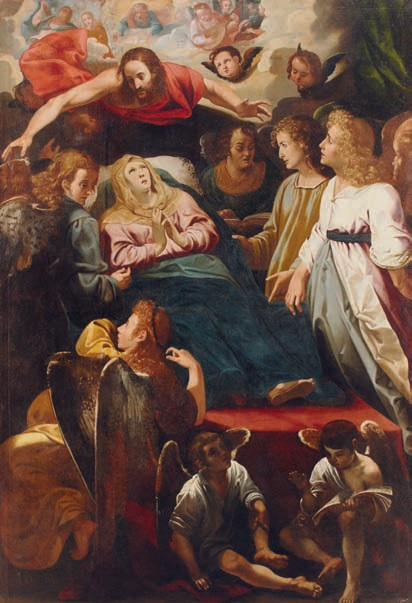 Tránsito de la Virgentitle QS:P1476,es:"Tránsito de la Virgen"